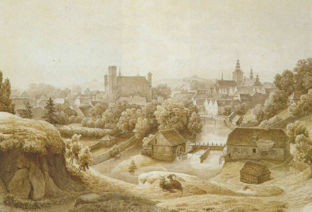 Hulsberg/Belgien?